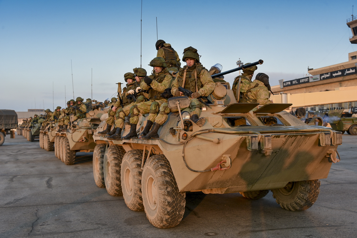 Работа сапёров Международного противоминного центра Министерства обороны России в Алеппо (Сирия)